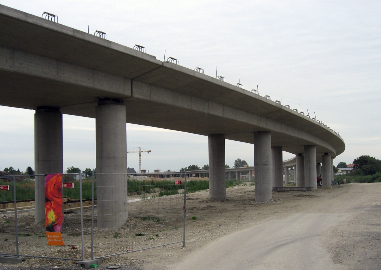 Wien U2 Bauarbeiten Donauspital Aspernstraße